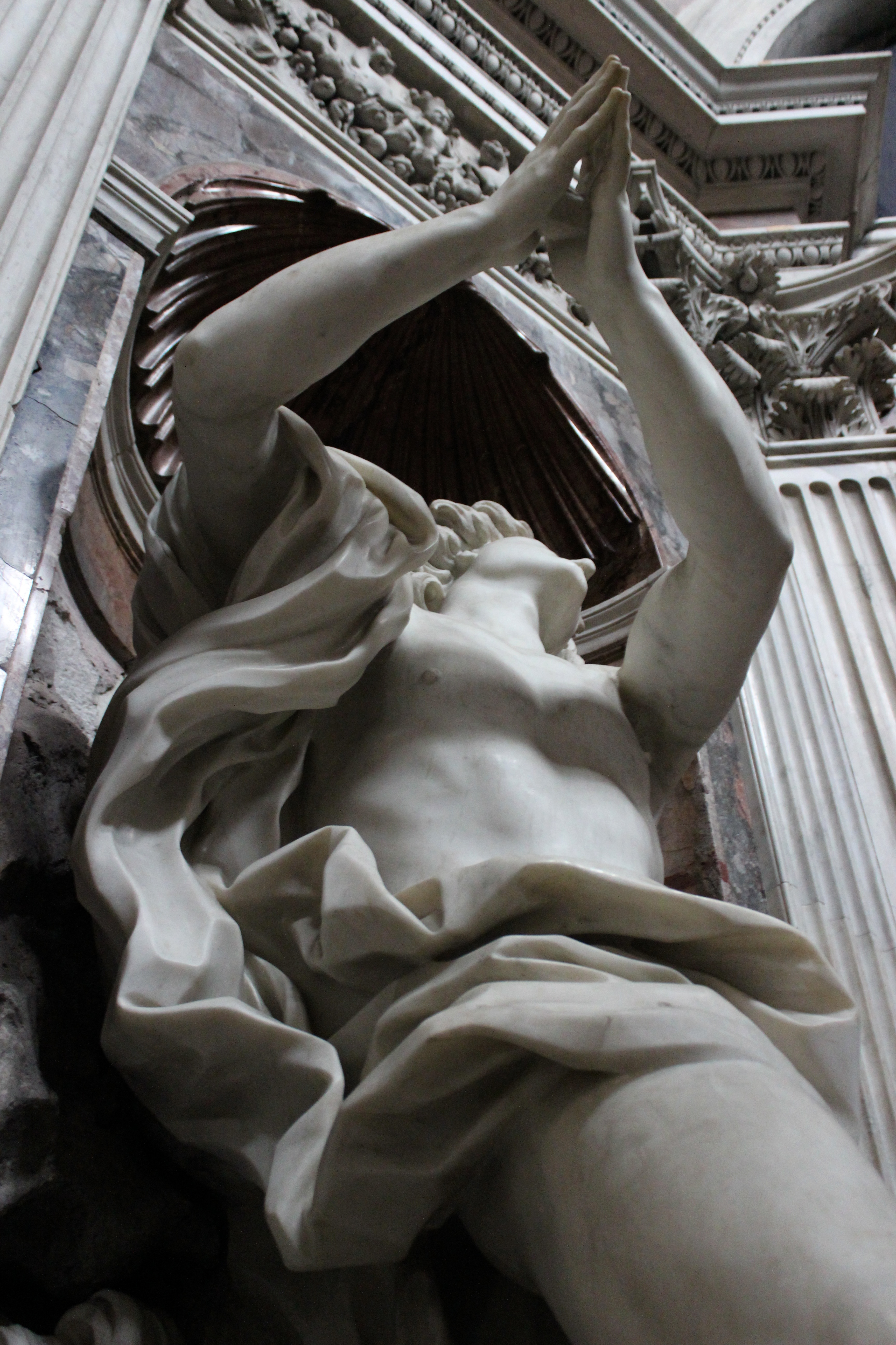 Roma. Santa Maria del Popolo. Capilla Chigi. Daniel por G.L. Bernini.